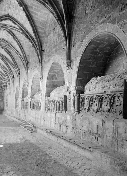 Imatge